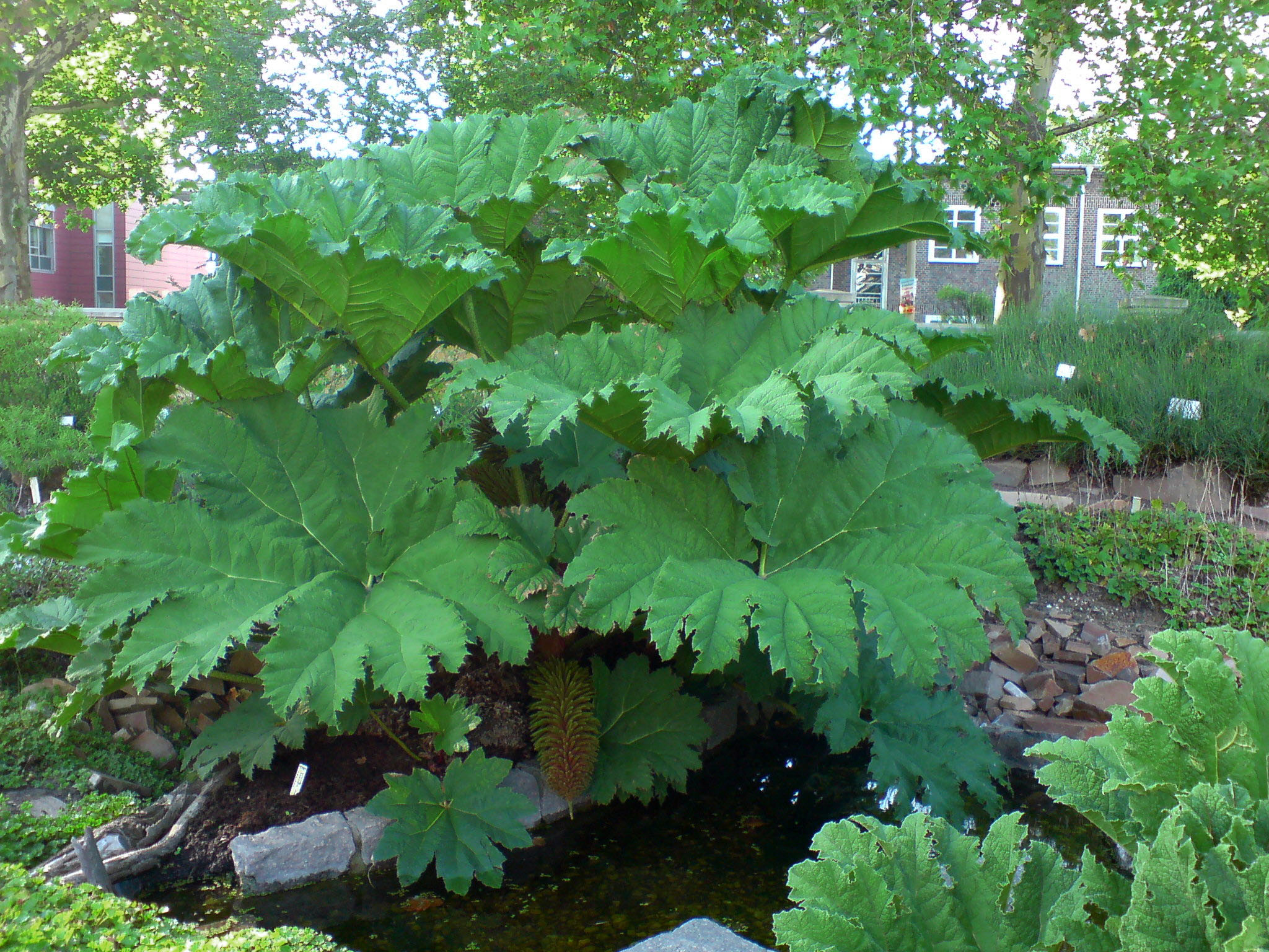 Gunnera manicata (Mammut-Blatt) - Botanischer Garten Leipzig